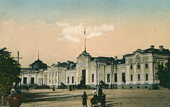 Центральный вокзал города Царицын (в настоящее время Волгоград-1